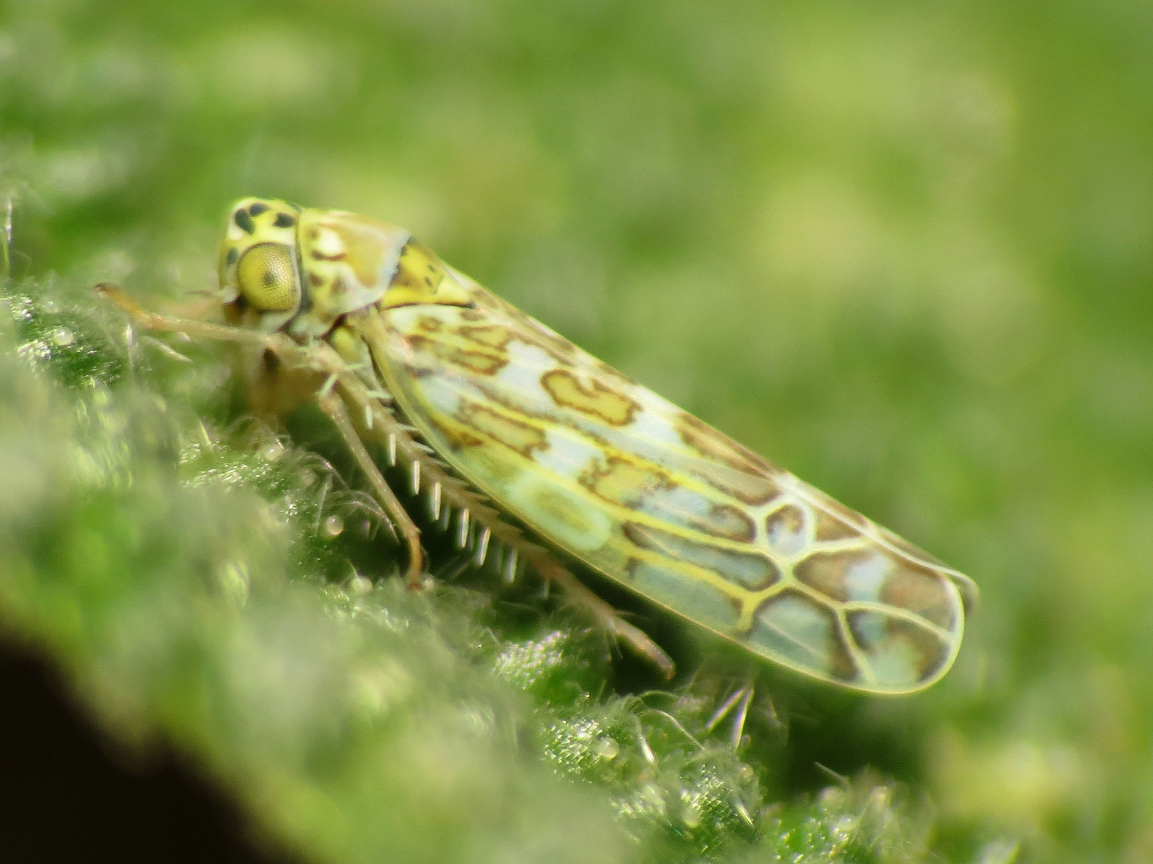 Eupteryx melissae. Els Poblets, Alicante, Spain